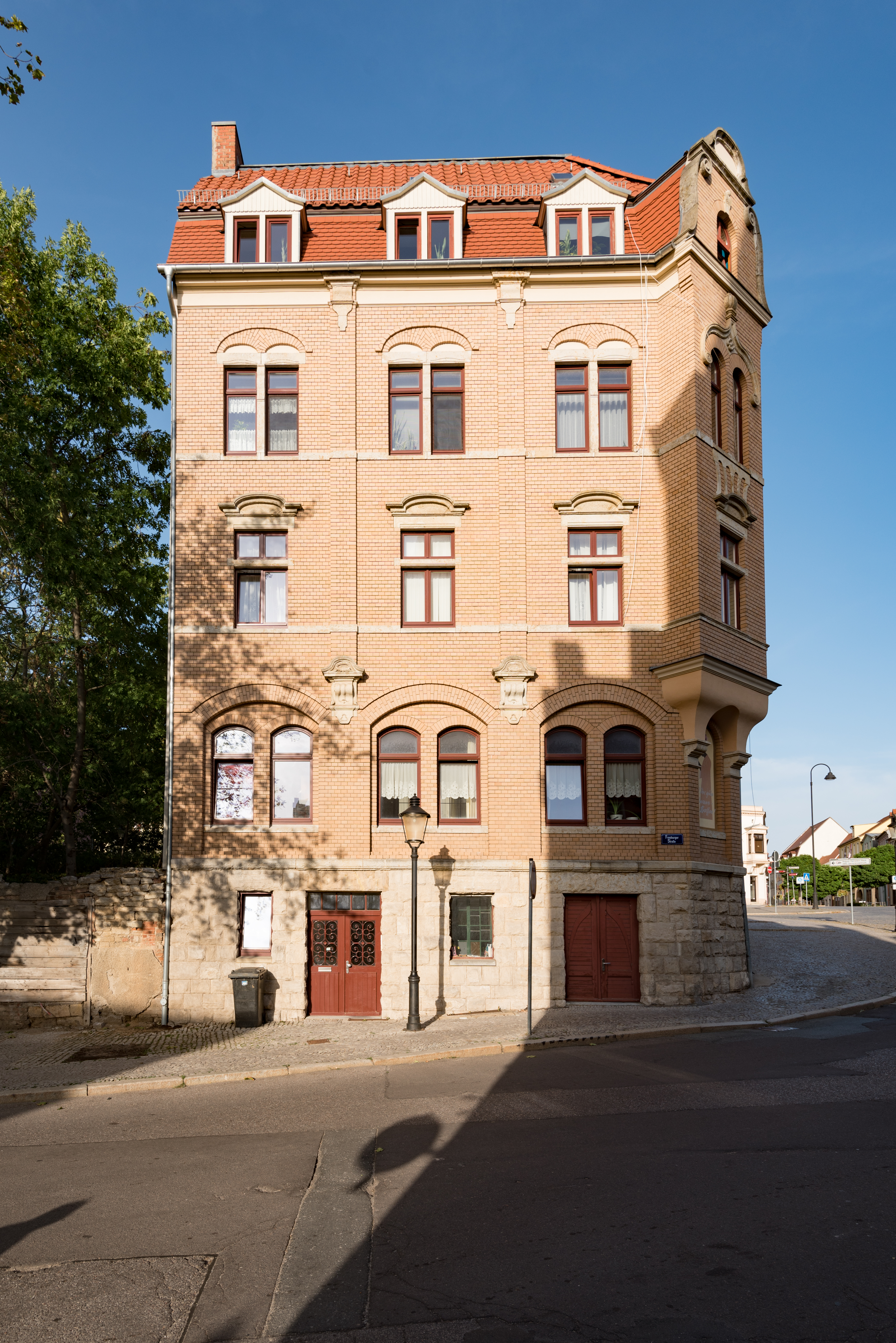 Naumburg (Saale), Kramerplatz 5